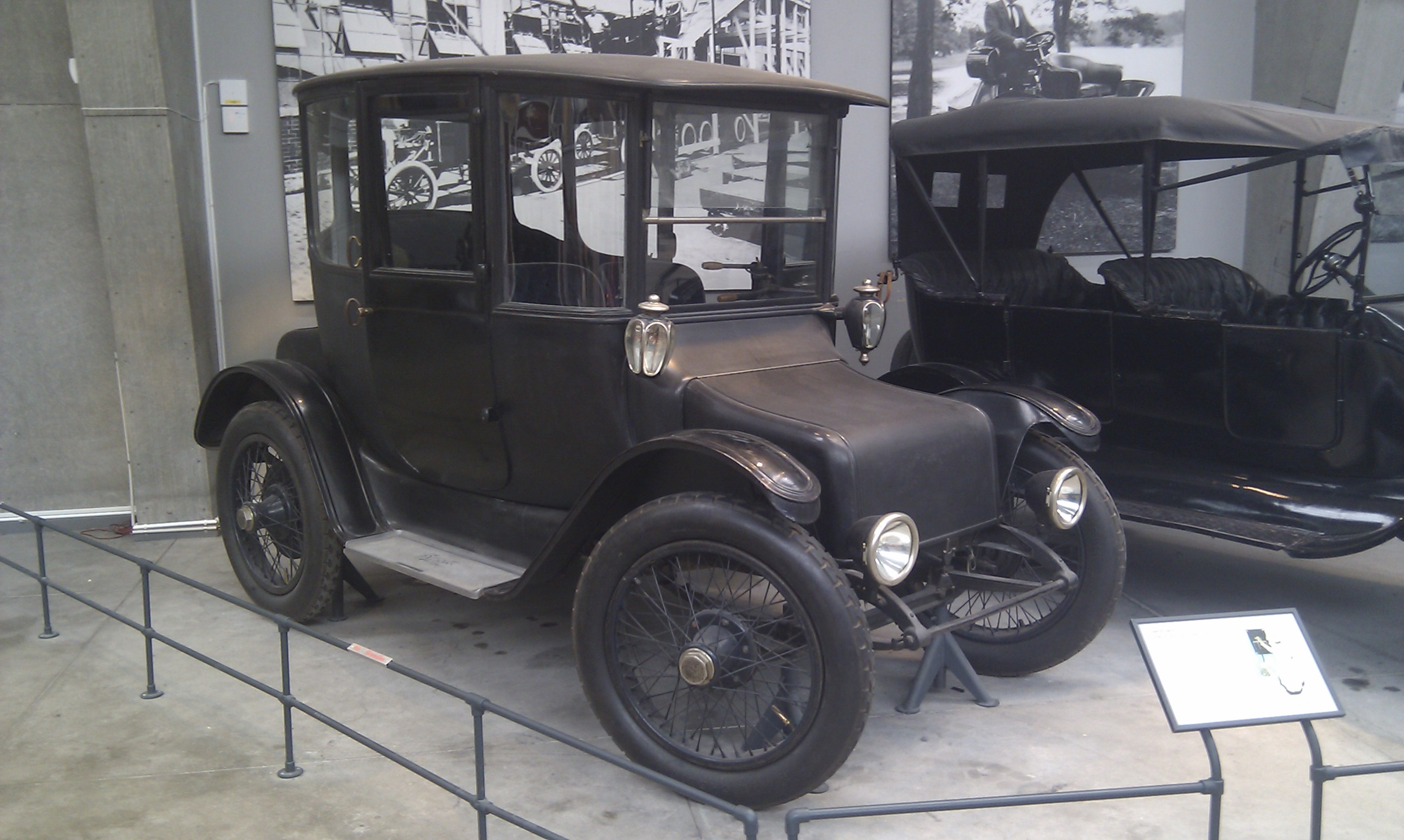 Elektriauto Detroit Electric 1915. Anderson Electric Car Co, Detroit, USA. Pilt on tehtud Stocholmis Tehnikamuuseumis.